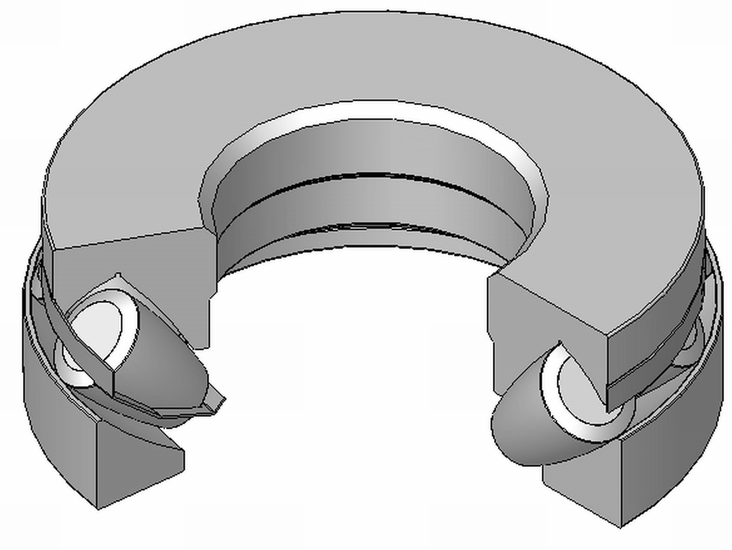 Axialpendelrollenlager, zerlegbar, Blechkaefig aus Stahl, 120°Schnitt, Hinweis: Innenaufbau des Lagers (insbesondere des Kaefigs) variiert je nach Hersteller und Baugroesse rolling contact bearings